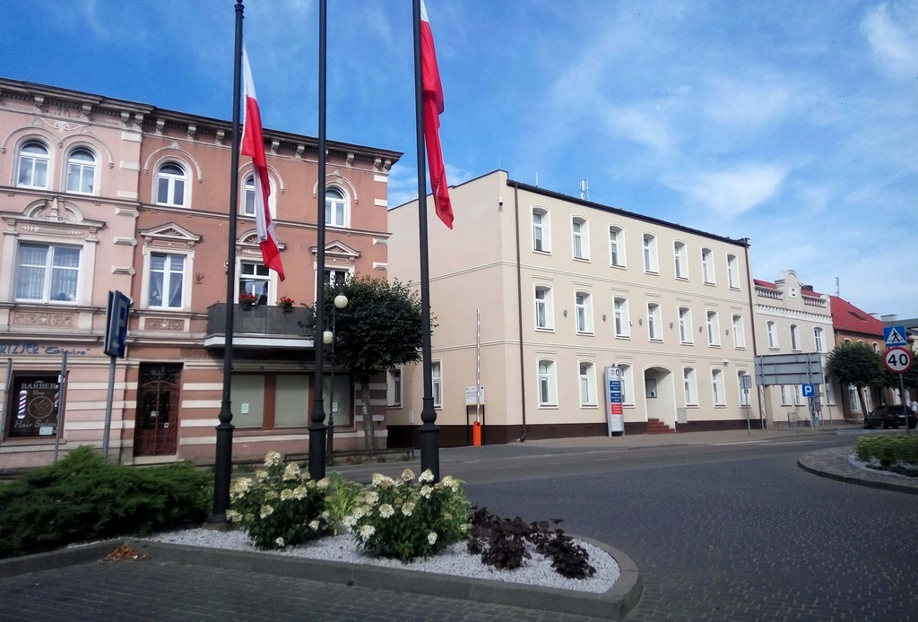 Urząd Miasta i Gminy Pelplin